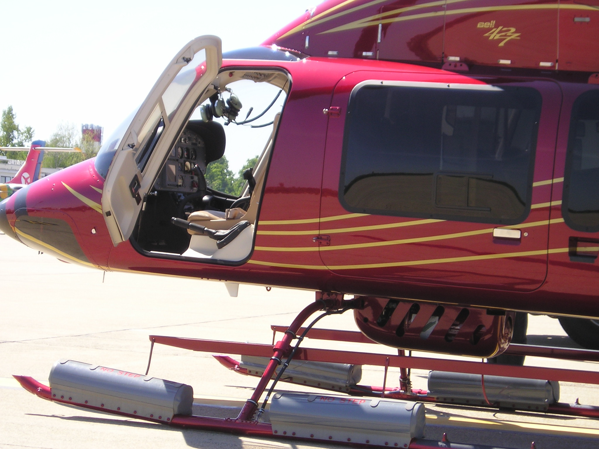 Bell-427 cockpit